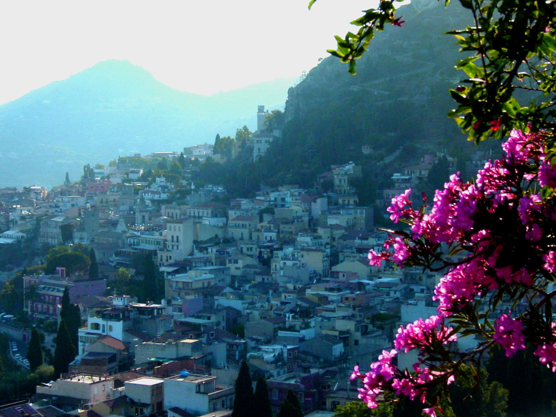 Таормина, Сицилија (слику направио Борис Малагурски) ☺ Ову слику је направио Борис Малагурски.